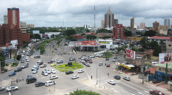 vista panorámica de la zona norcentral de Santa Cruz de la Sierra